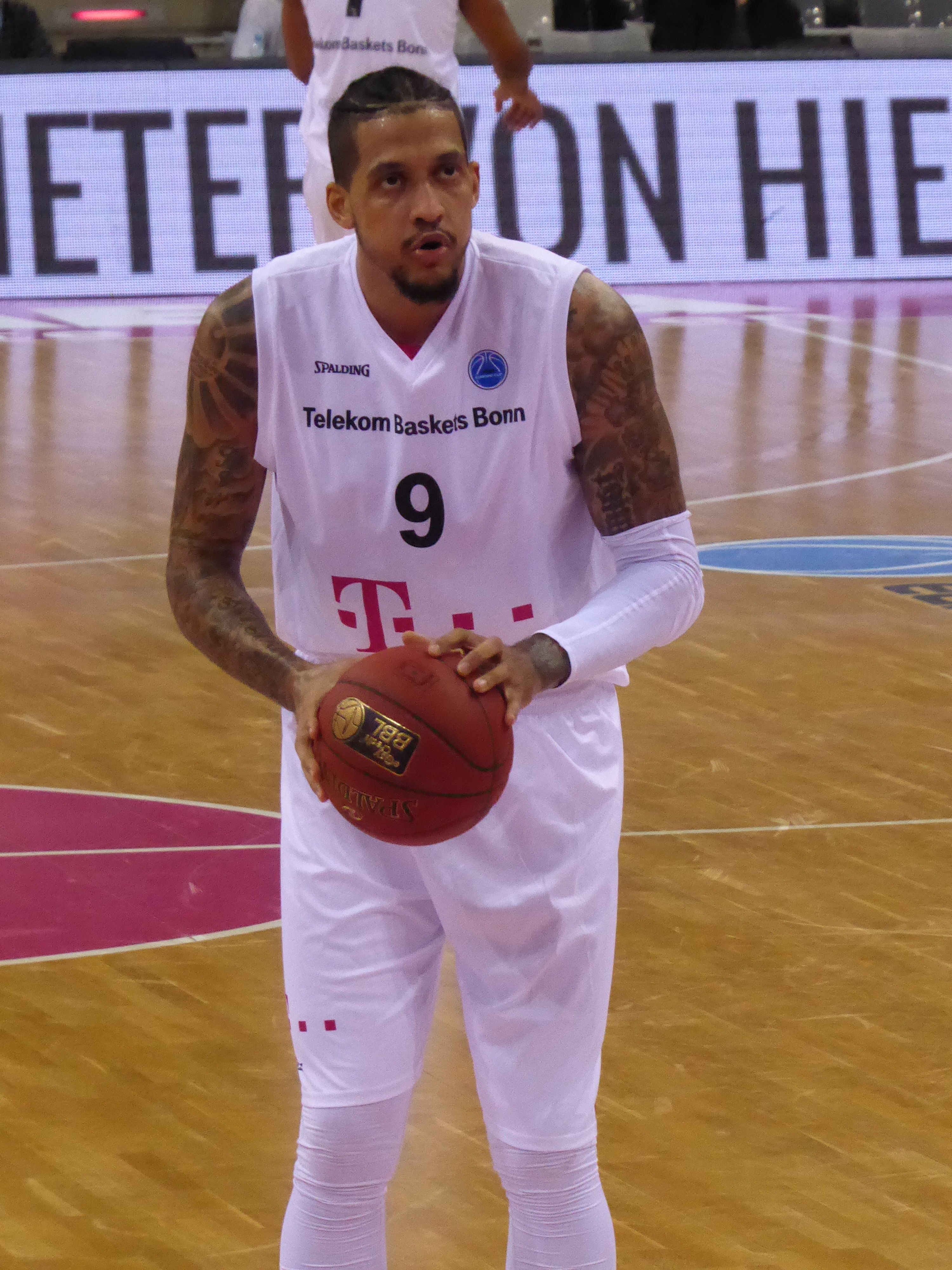 Julian Gamble beim Spiel der Telekom Baskets Bonn gegen APOEL Nicosia am 14. Dezember 2016.